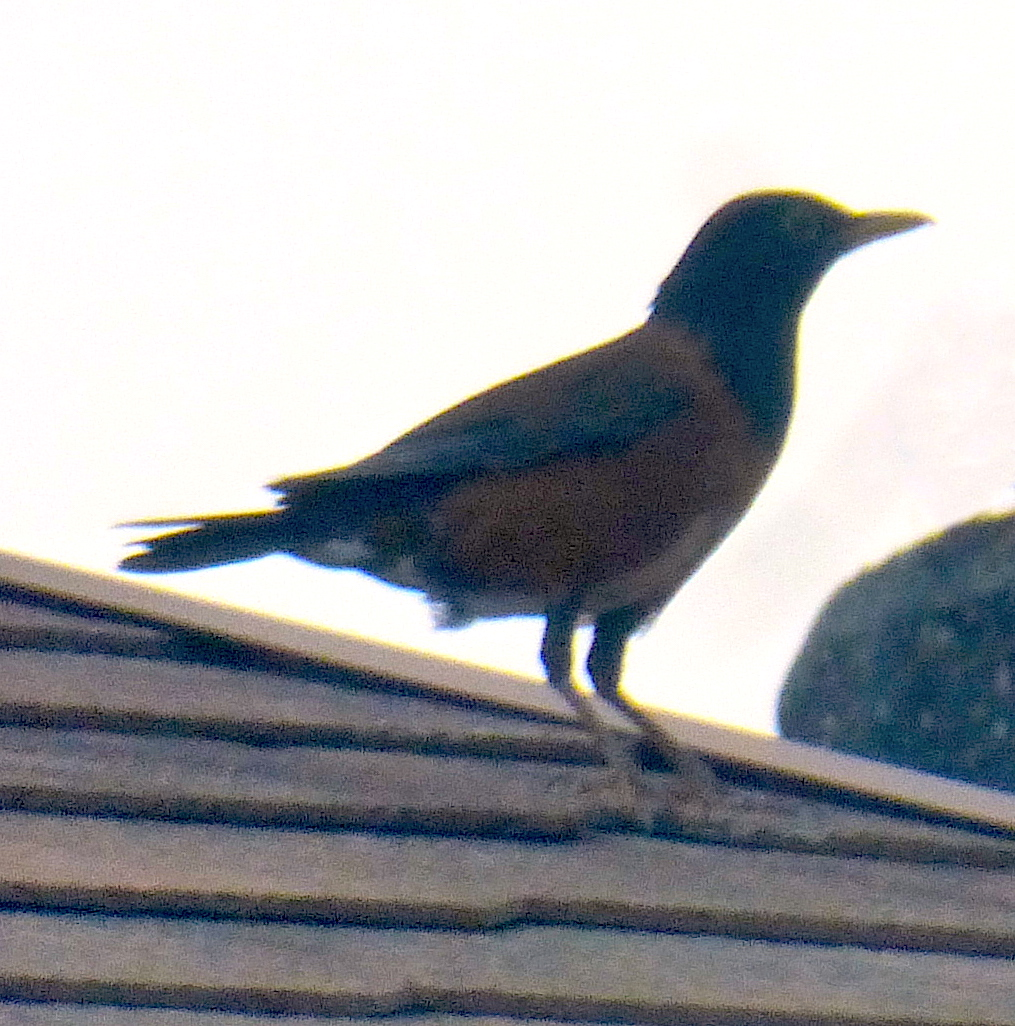 アカコッコ（島赤腹、Turdus celaenops、Izu thrush）